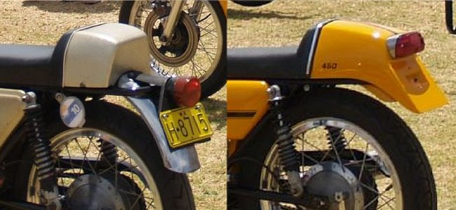 Ducati Desmo 450 1ª serie del 1971 (grigio) e 2ª serie del 1973 (giallo)